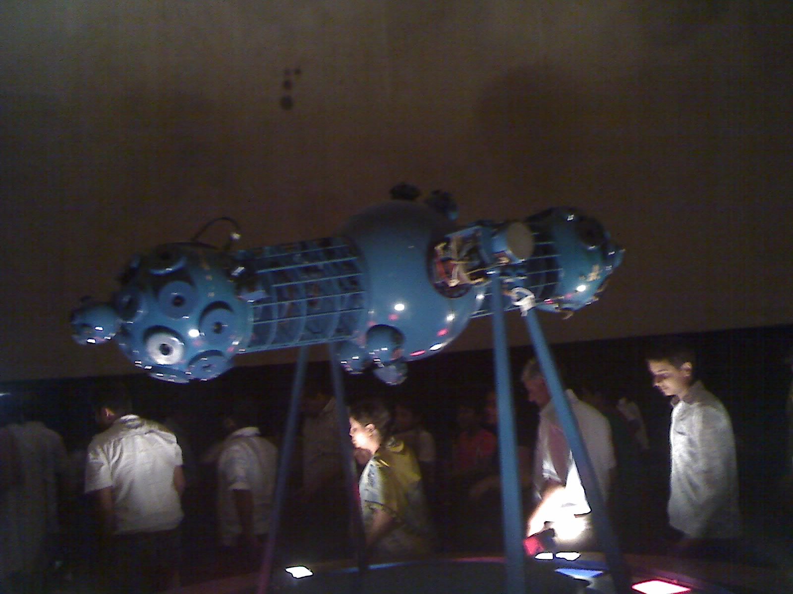 तारामंडल की मशीन